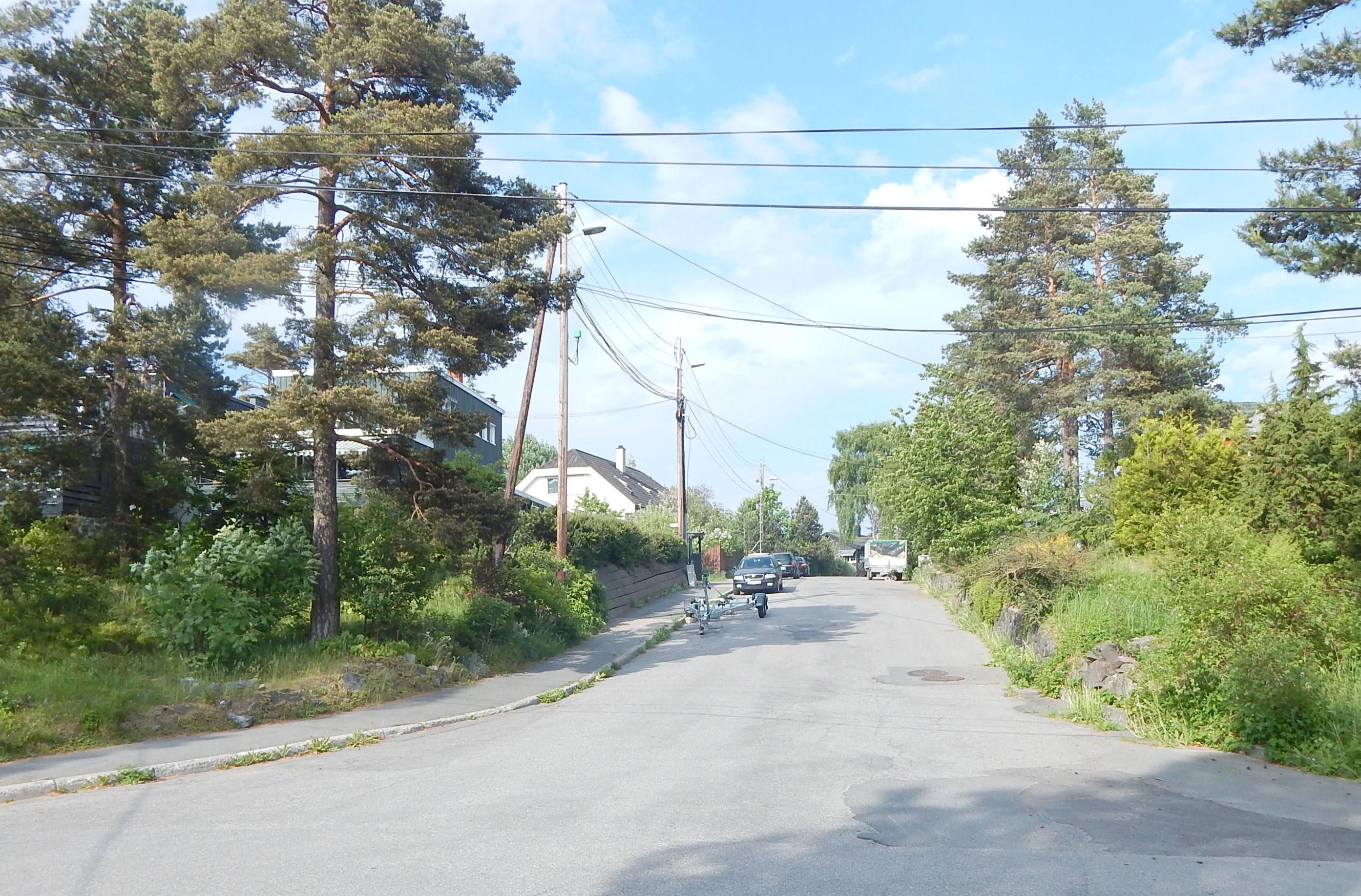 Bauneveien (nordre del) sett østover fra Vardeveien